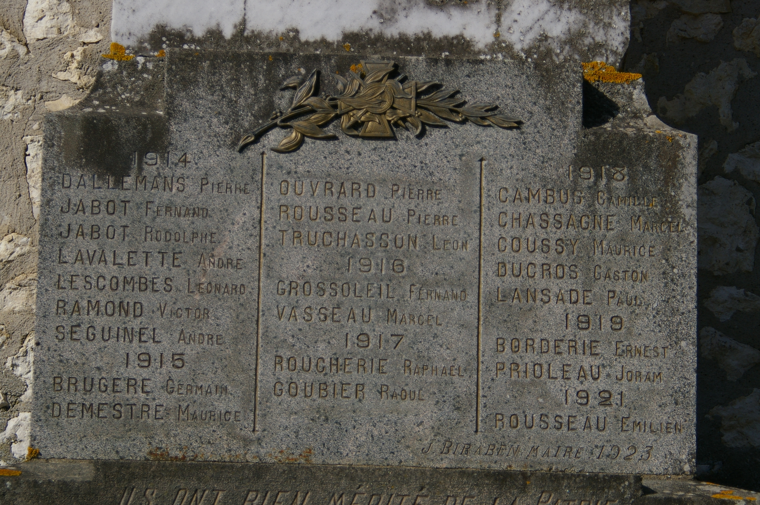 Description : Monument aux morts Lieu : Soumensac Lot et Garonne Date de prise de vue : novembre 2006 Auteur : Annie Collin